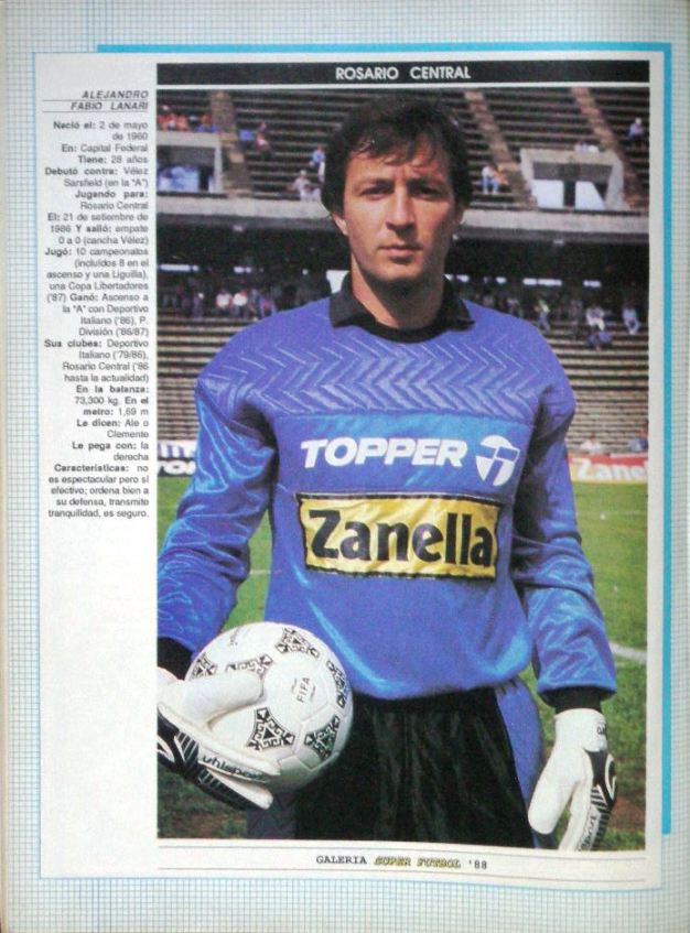 Alejandro Lanari